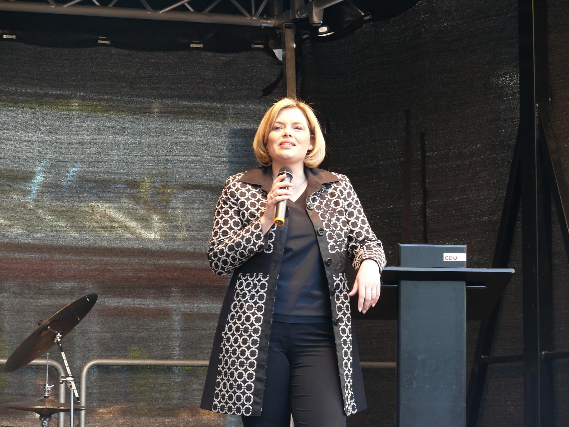 Julia Klöckner bei Wahlkampfauftritt in Ludwigshafen